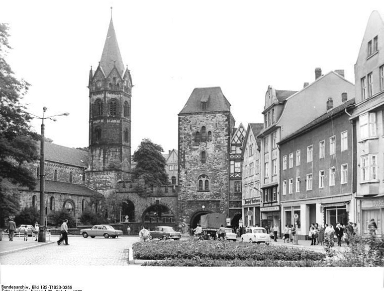 Eisenach, Nikolaitor, Nikolaikirche ADN-ZB Ludwig Bez. Erfurt: Blick auf den Platz der Deutsch-Sowjetischen-Freundschaft mit dem Nikolaitor und der Nikolaikirche in Eisenach.